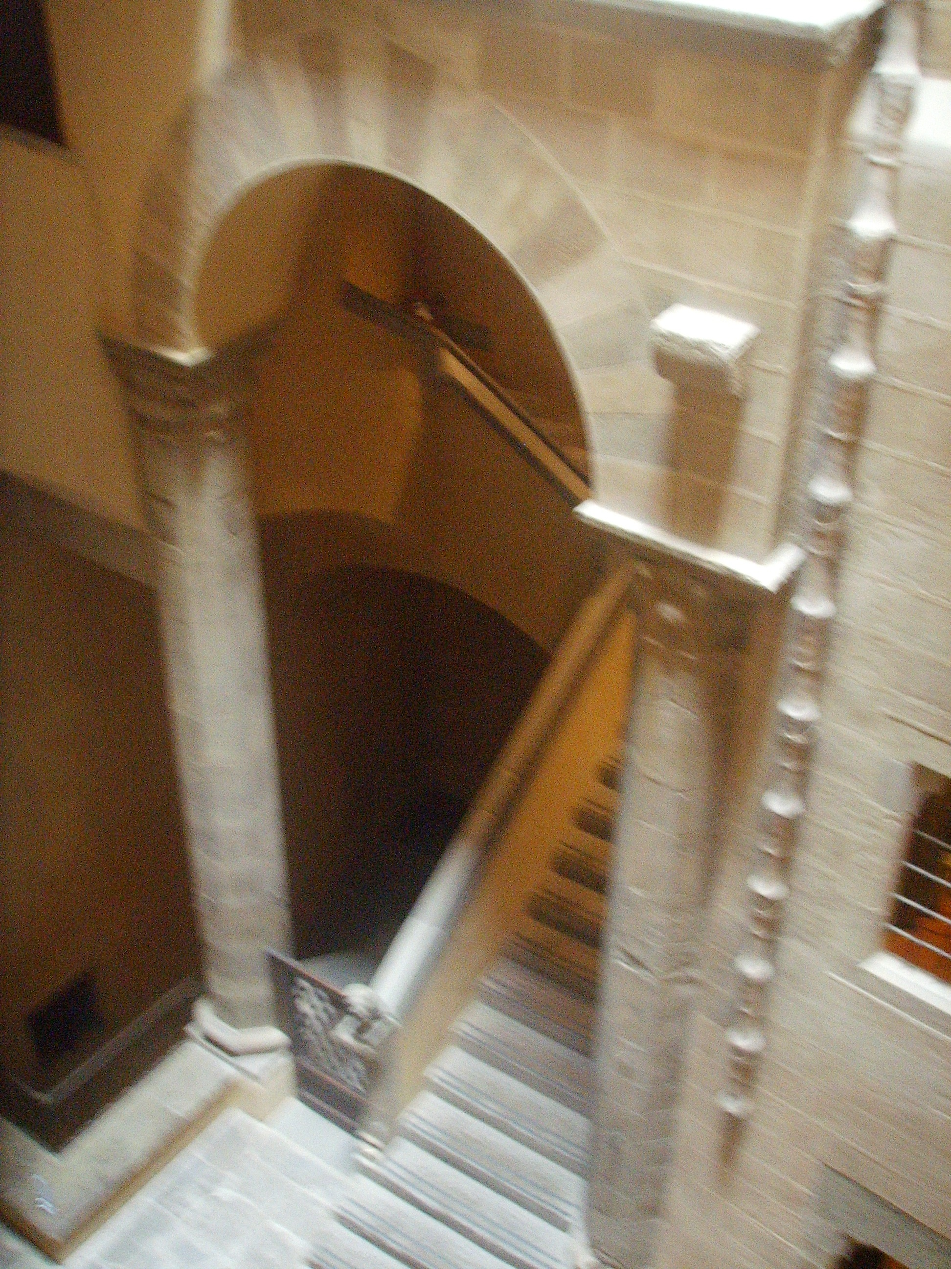 Davanzati Palace, Museum of antique florentine house (Museo della Casa fiorentina antica) stairs in Florence, Italy